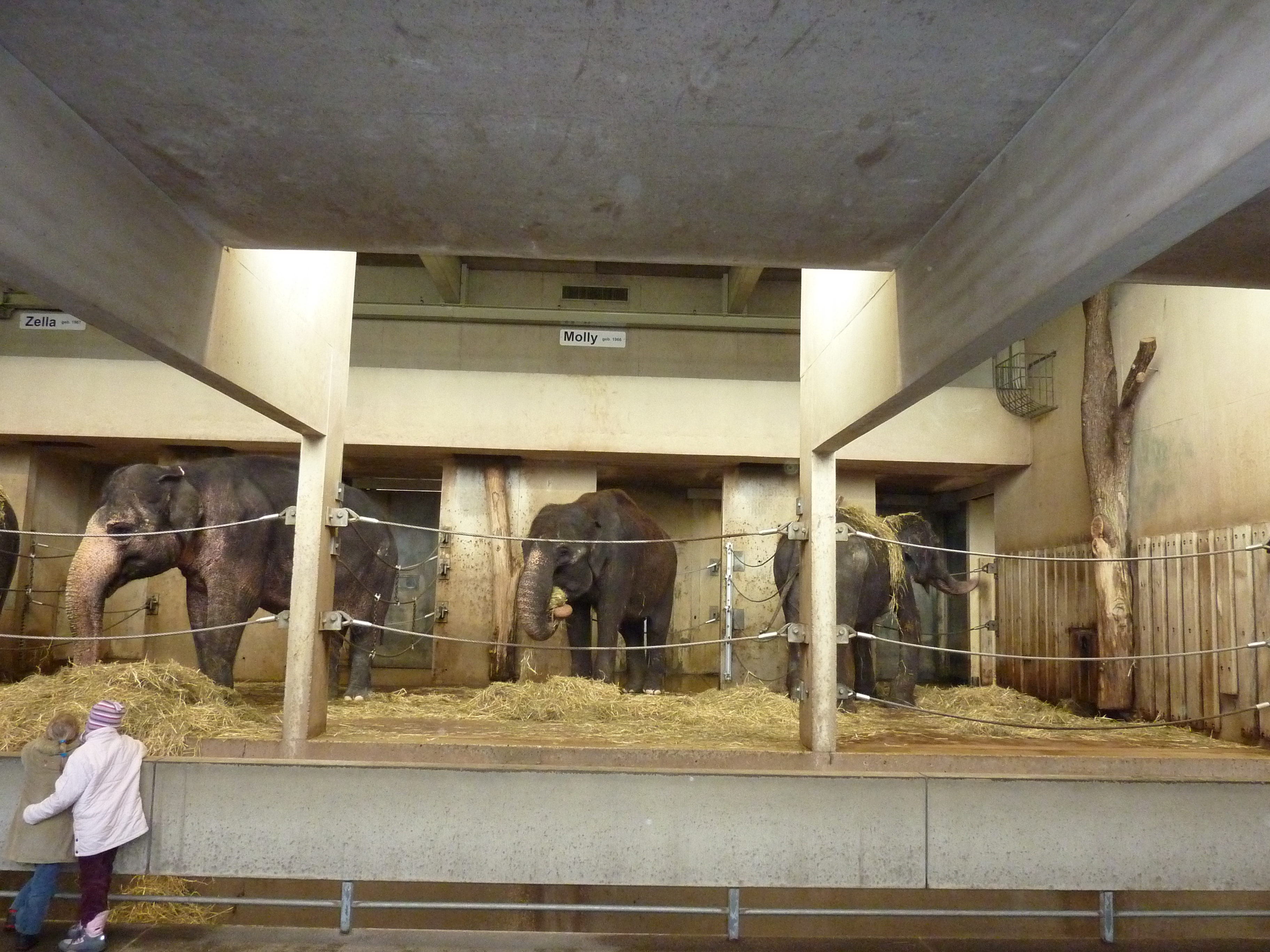 Inneres des Elefantenhauses der Wilhelma, das nach 2012 ersetzt werden soll